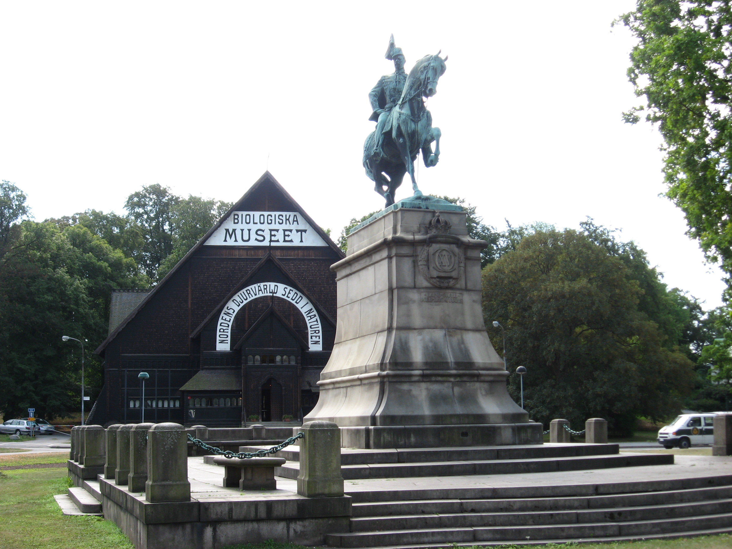 Biologiska Museet (Biology Museum) in Djurgården, Stockholm, Sweden.